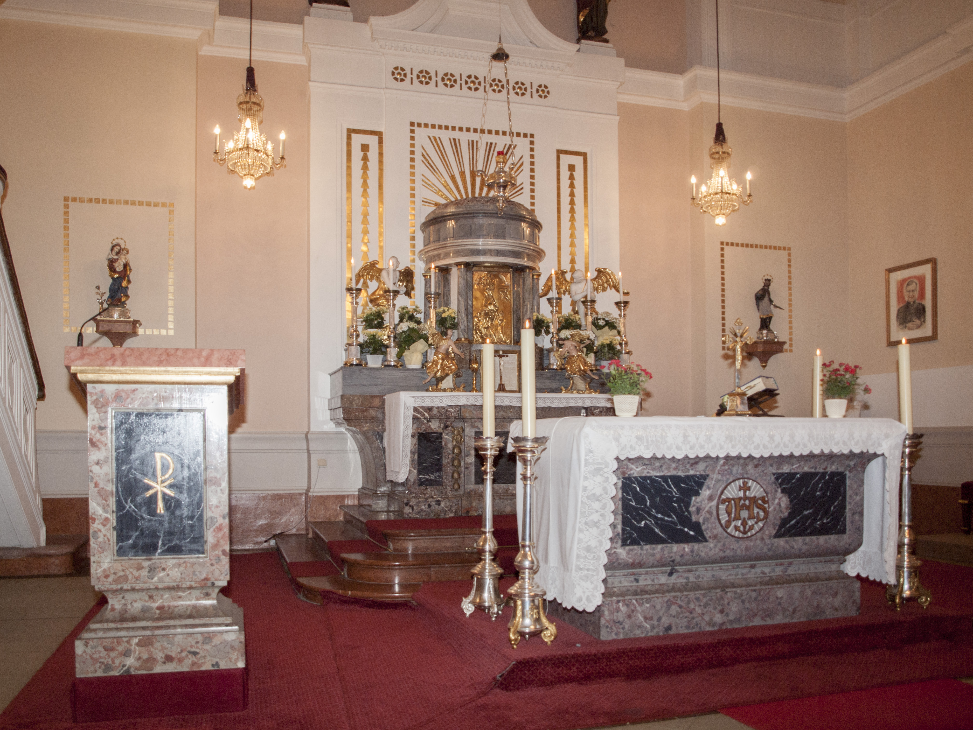 Gesamtanlage ehem. Invalidenhaus